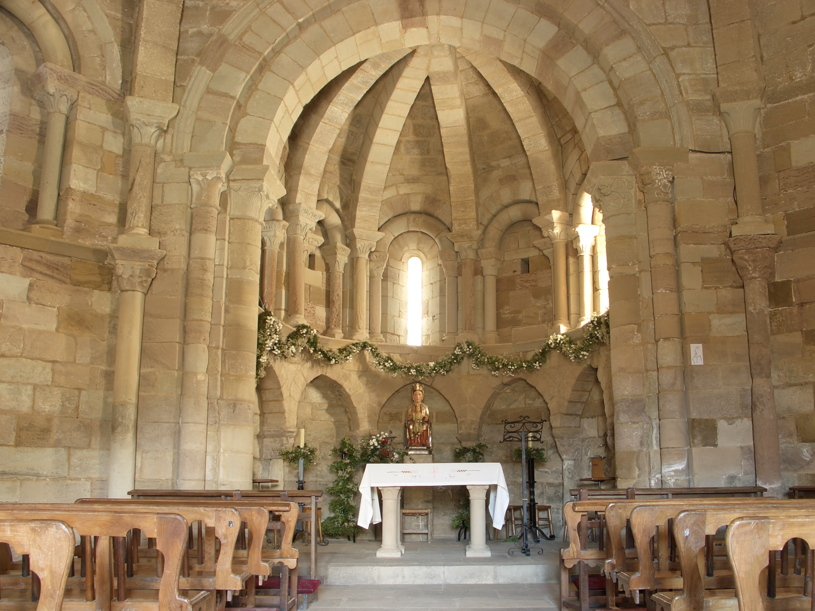 Santa Maria d'Eunate - Interior